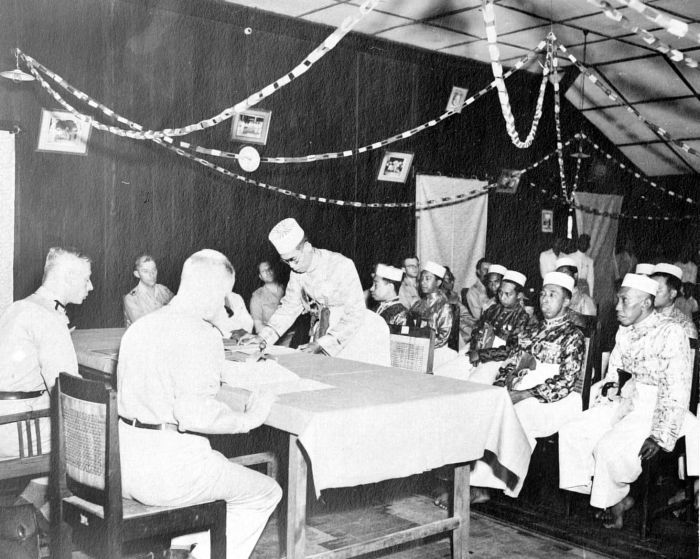 Repronegatief. De raja van Goa ondertekend de Korte Verklaring in zijn woning